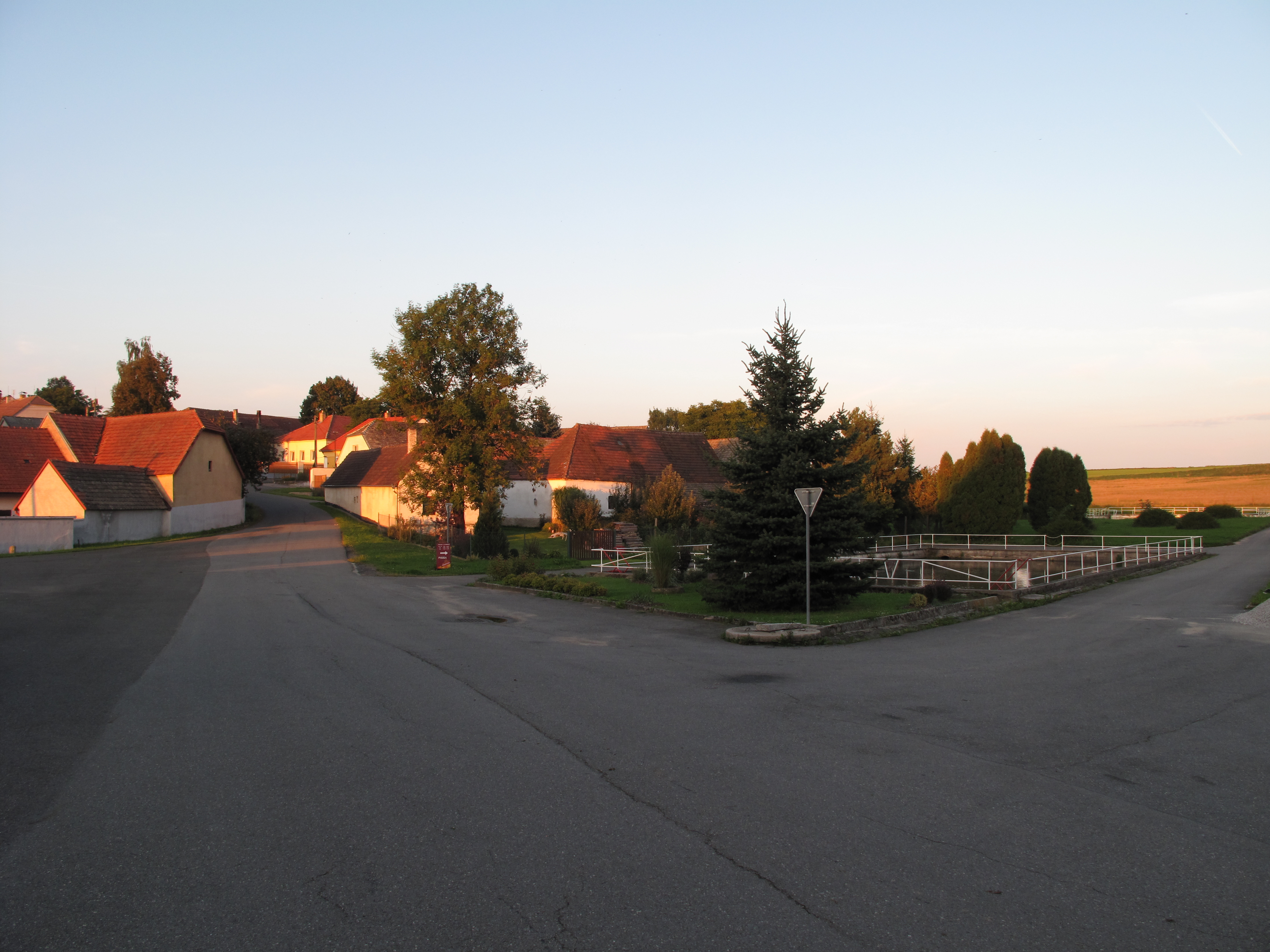 Rozcestí v Doubravě. Okres České Budějovice, Česká republika.